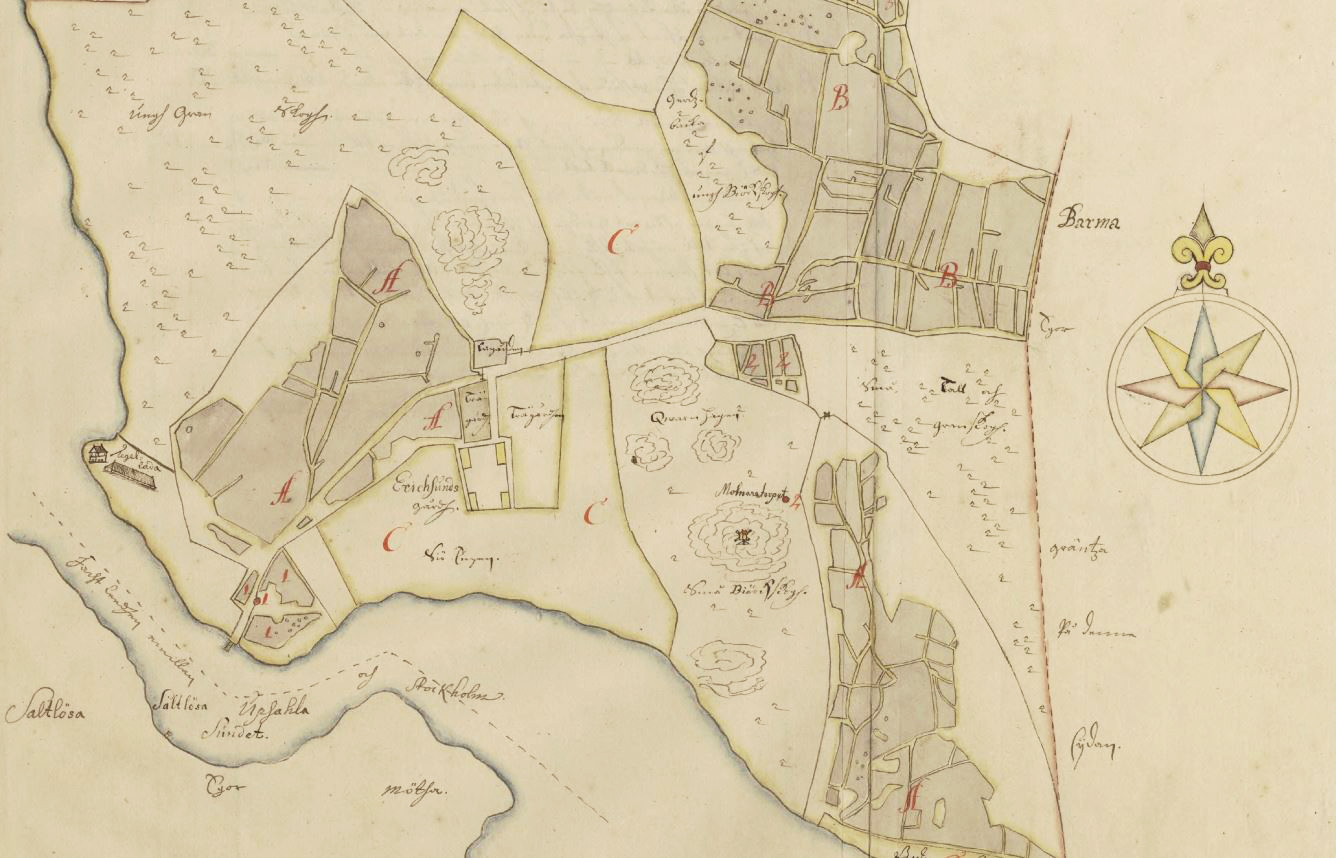 Karta över del av egendomen Erikssund